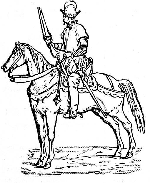 Французский карабинер (1550 год). Это изображение было использовано для иллюстрирования статьи «Карабинеры» опубликованной в двенадцатом томе «Военной энциклопедии», который был издан книгоиздательским товариществом И. Д. Сытина в 1913 году в столице Российской империи городе Санкт-Петербурге. Подробное описание к этой картинке можно прочесть в указанной статье.